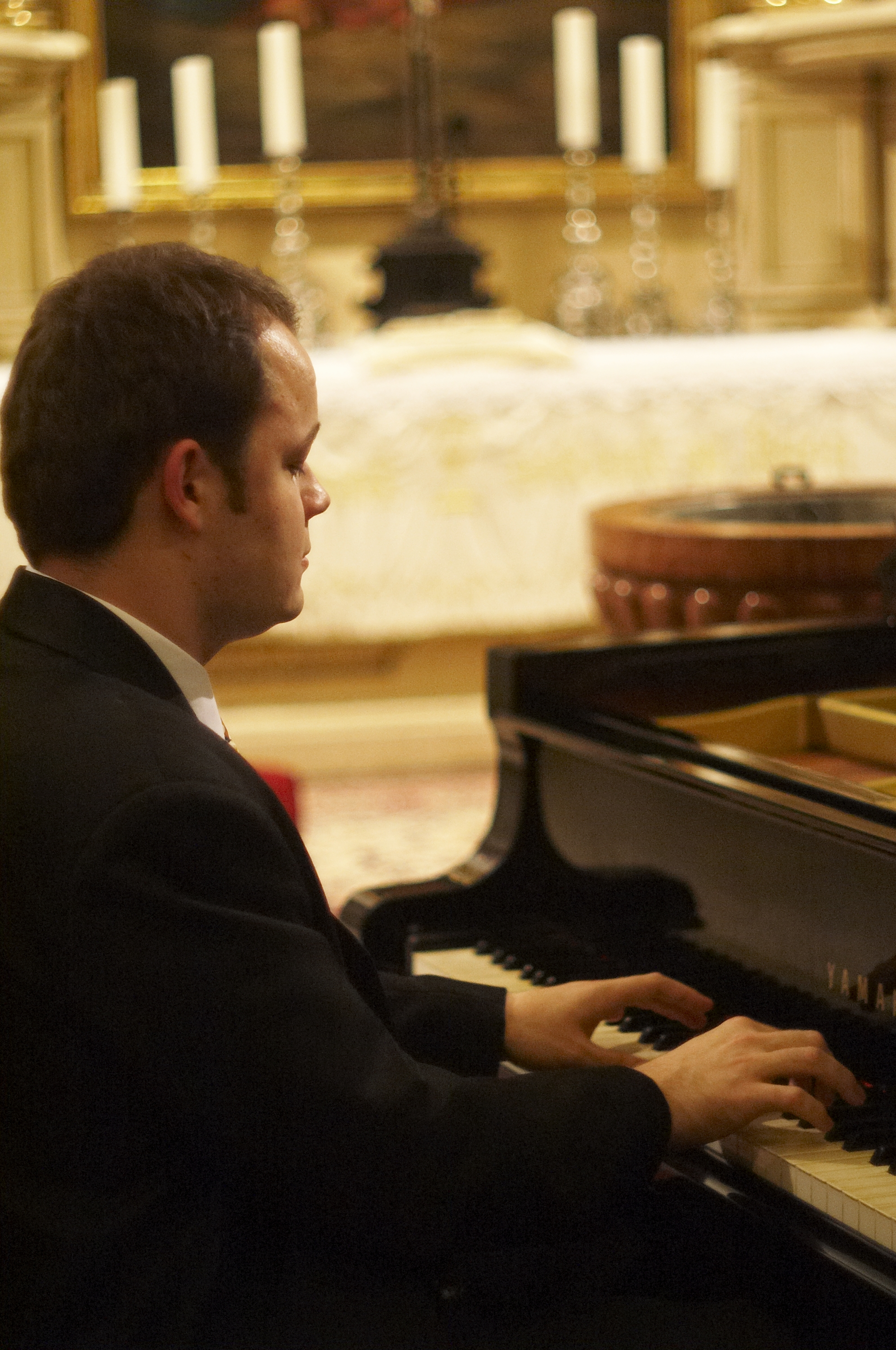 Roland által készített